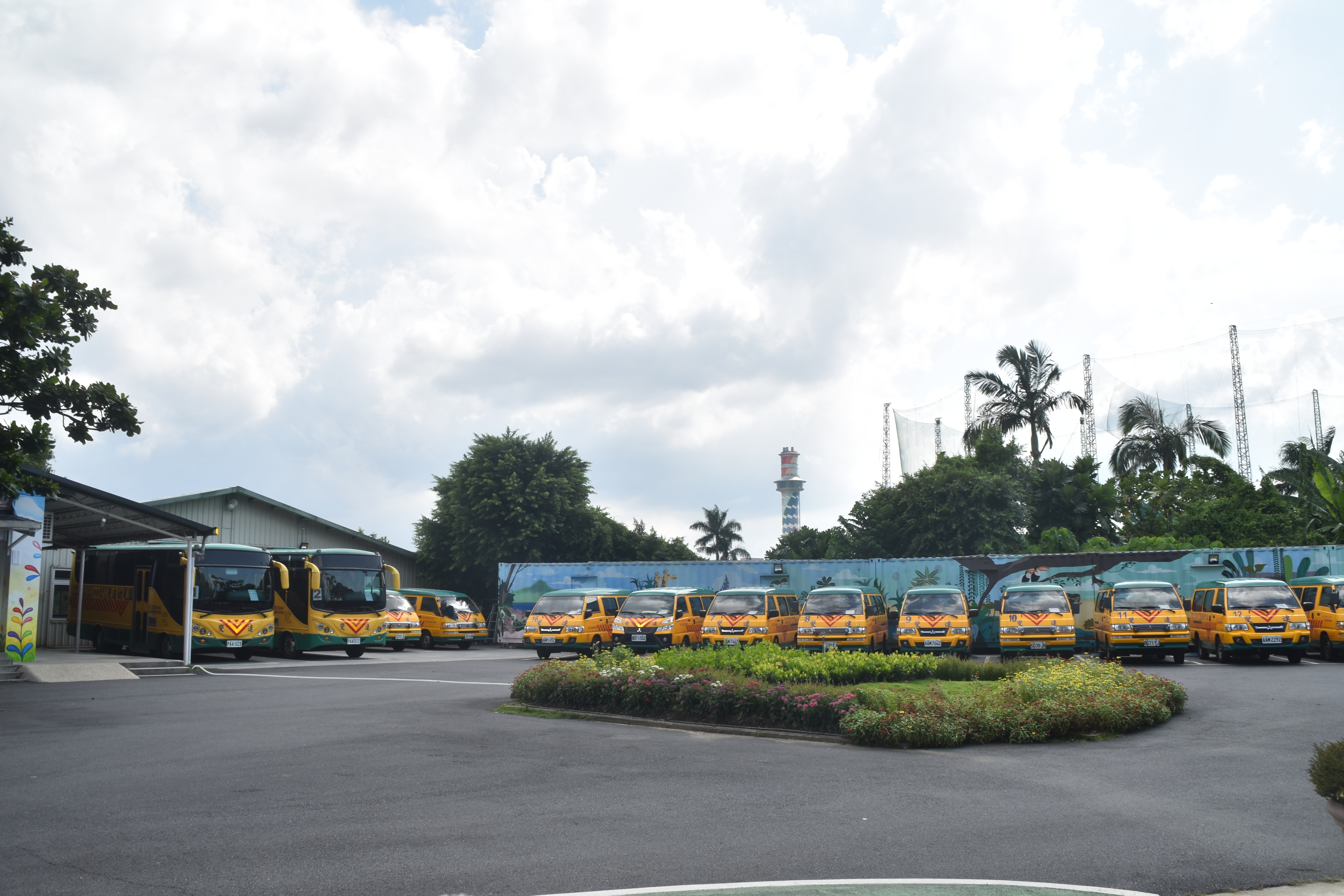 中文（台灣）: 雙連長老教會，紀以前的台北中山北路一帶，荒涼的石頭路間成立了一所「牛埔庄講義所」，從最初提供外國宣教士聚會的場所，進而成立雙連教會，再到改建成現代化建築，雙連長老教會不僅開教界先河，成立雙連幼稚園，還致力關懷視障和老年族群。雙連幼兒園。 0601818,121.5210143, 雙連長老教會台北市中山北路2 段111號座標25.0601818,121.5210143